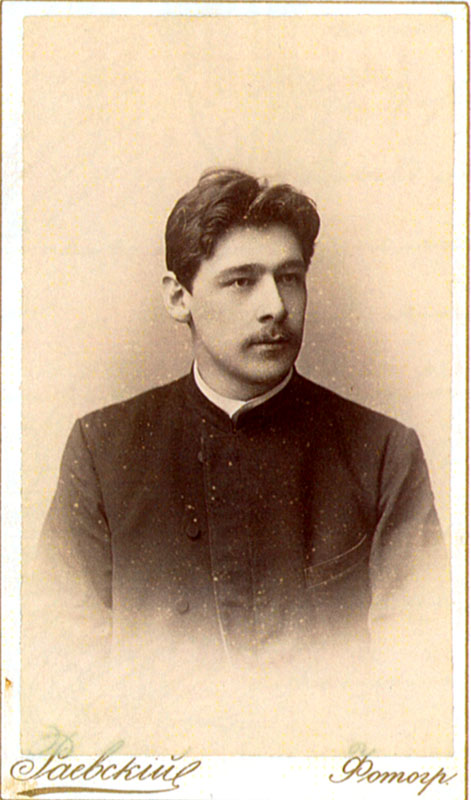 Пётр Юльевич Зубов (1871—1942) — ученик Вологодского реально училища, в будущем земский начальник, товарищ головы города Вологды (1918), член Временного правительства Северной области (1918—1920), актёр провинциальных театров.